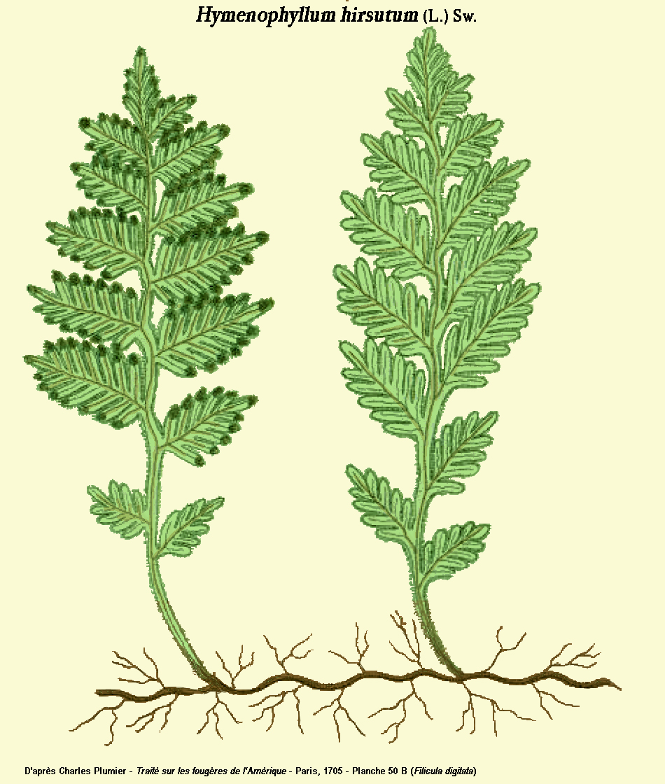 Hymenophyllum hirsutum (L.) Sw. - Dessin de Charles Plumier : Filicula digitata - planche 50 B reprise du Traité sur les fougères de l'Amérique - Paris, 1705